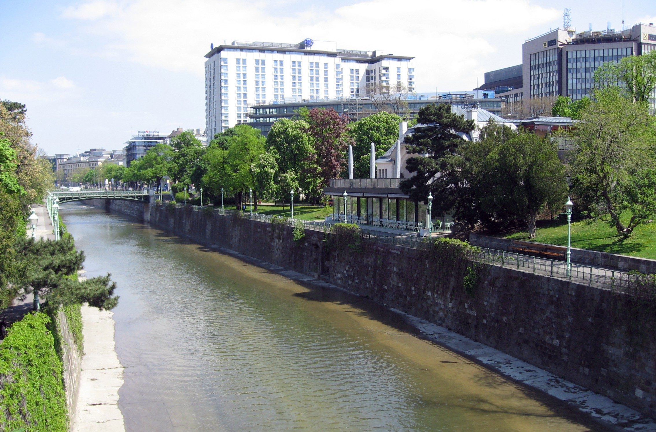 Wien Stadtpark Wienfluss flussabwärts